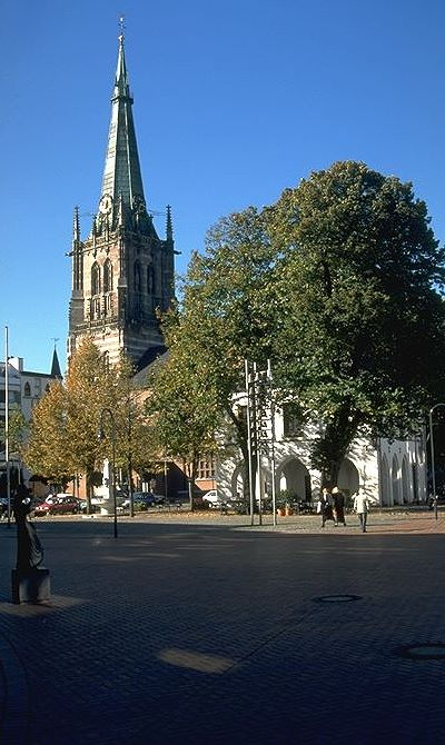 Erkelenz, Blick über den Markt auf den Turm der Lambertus-Kirche